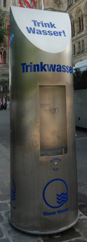 Euro-Brunnen, temporärer Trinkwasserspender mit Sprühdusche der Wiener Wasserwerke, über Hydrant verkranbar